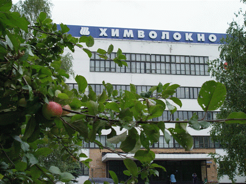 Здание заводоуправления ОАО «Химволокно», г. Щекино